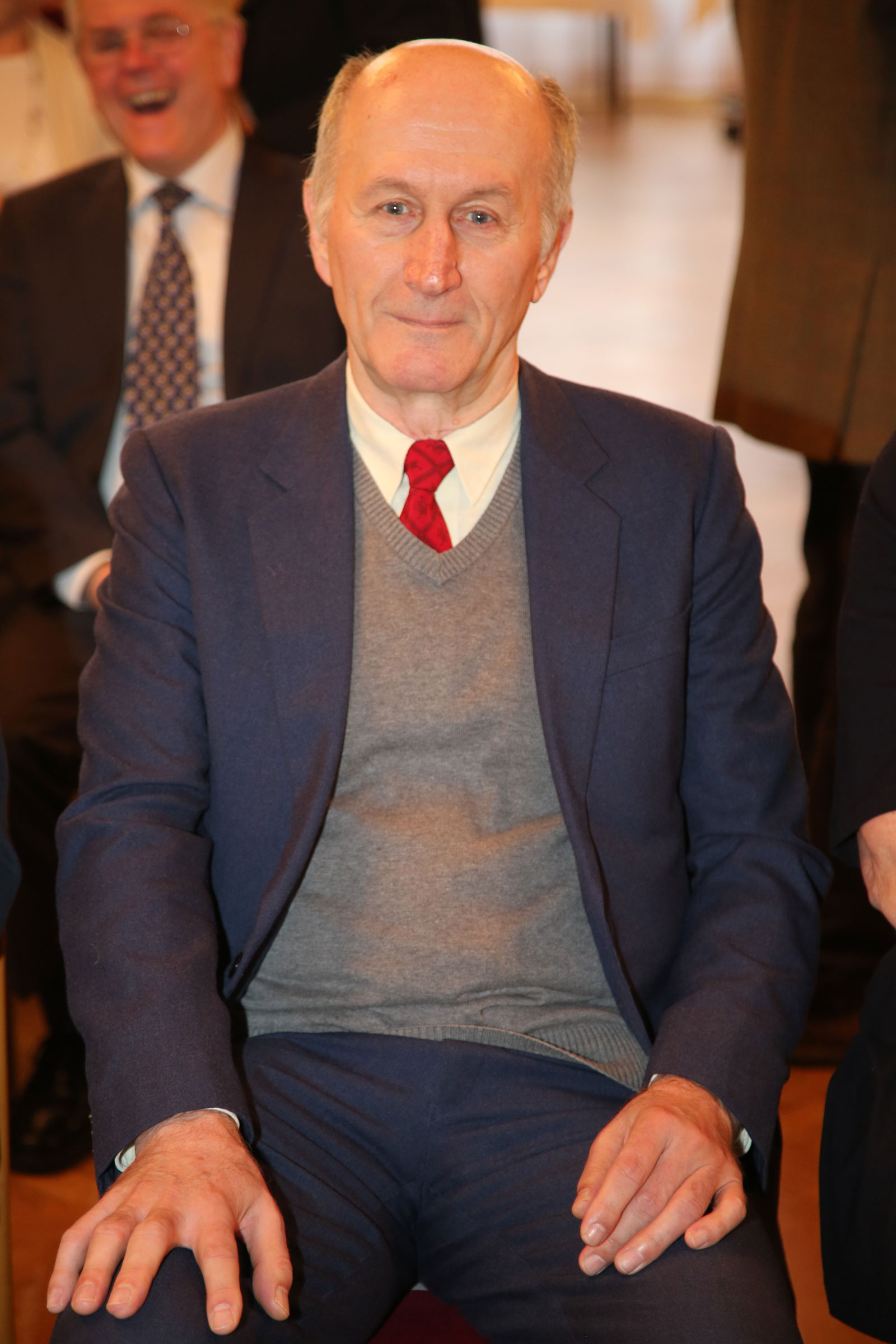 Raser.Ernst-6332